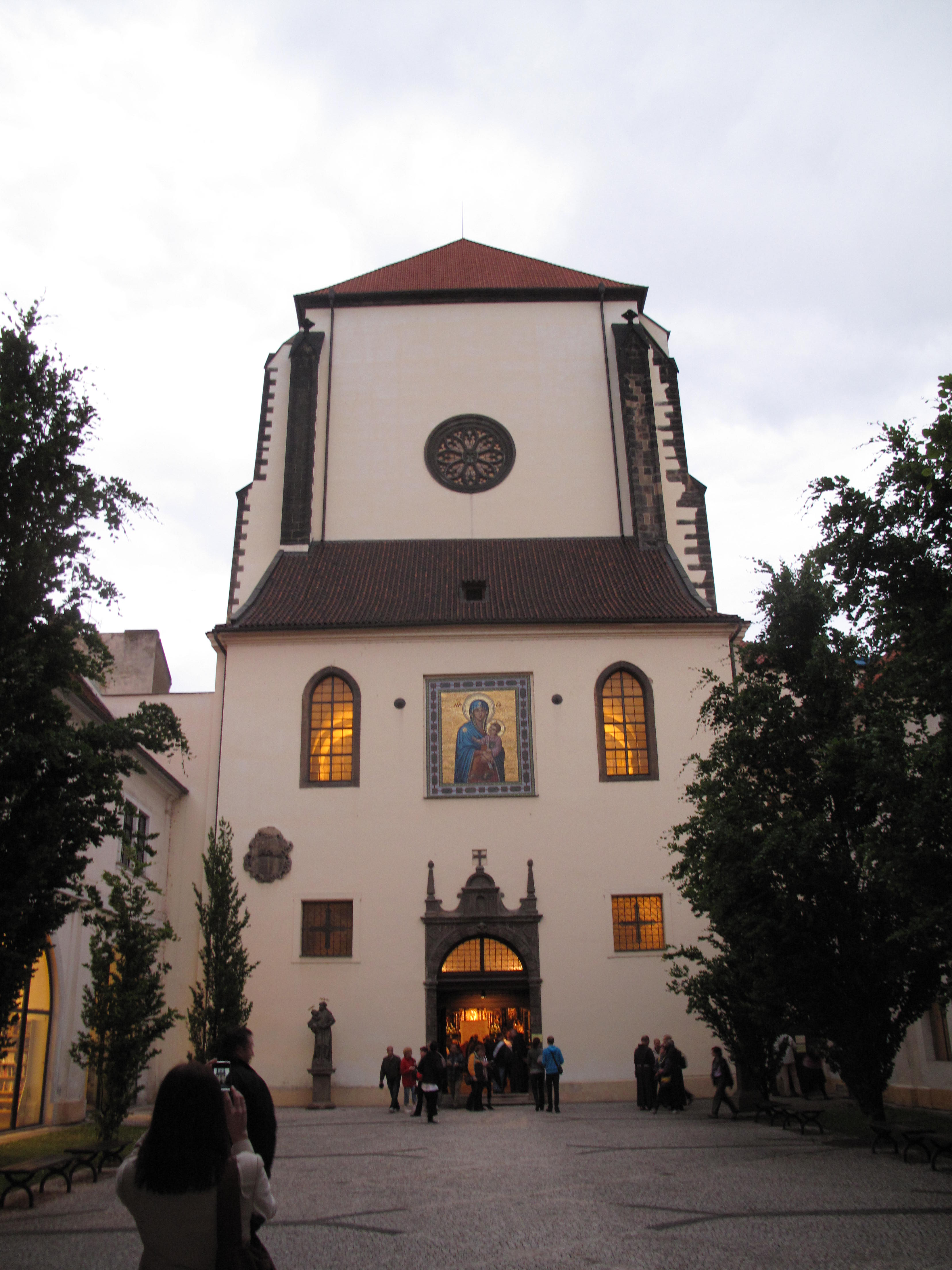 Kostel Panny Marie Sněžné, Noc kostelů 2011